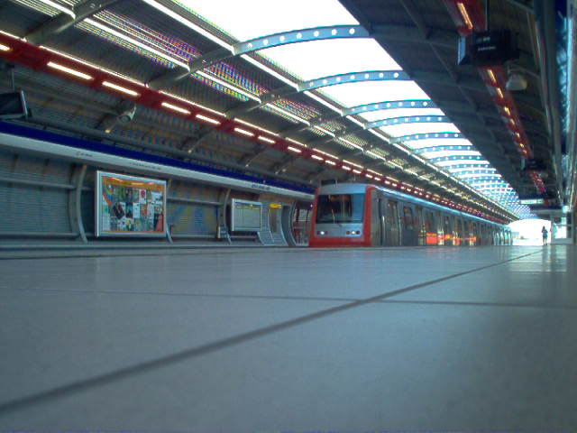 Imagen de estación Rojas Magallanes L4 por Der schöne Tod con cámara digital.